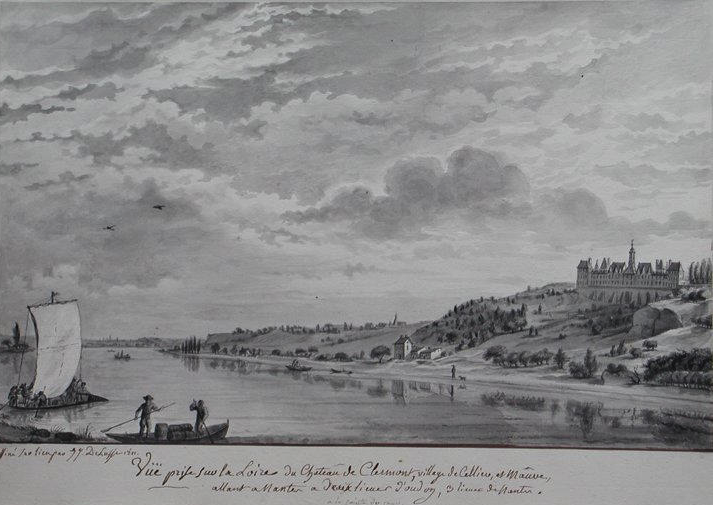 Dessin réalisé en 1801 par Jean Jacques Delusse. Cette œuvre est exposée au musée de la Marine de Loire à Châteauneuf-sur-Loire.